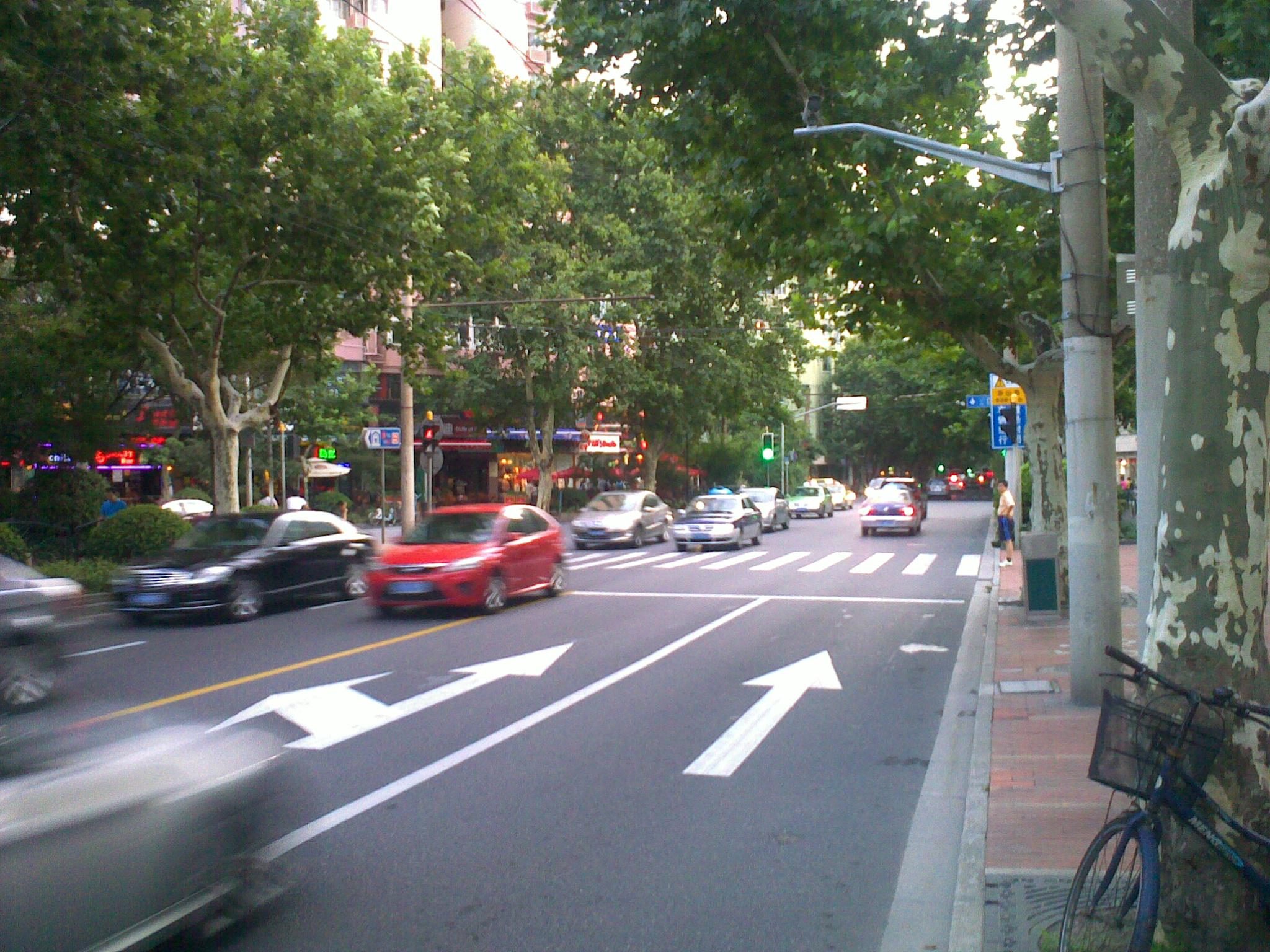 Hengshan allé